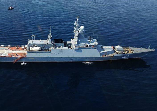 Корвет проекта 20380 "Совершенный"